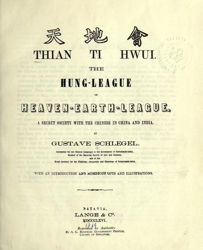 Gustaaf Schlegel (1840-1903) a Tiandihui nevű kínai titkos társaságról 1866-ban megjelent nagy jelentőségű tanulmányának előlapja.